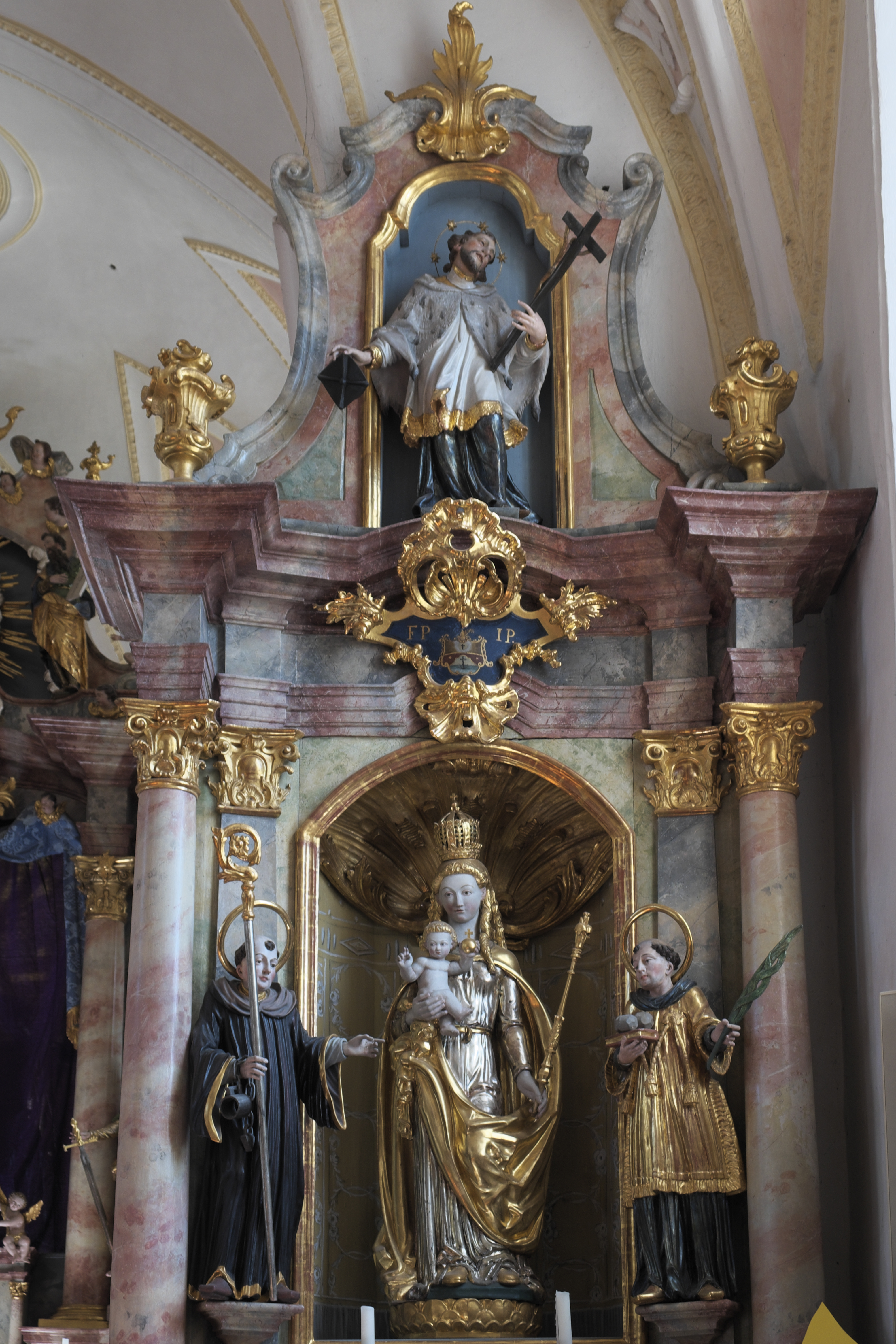 Katholische Pfarrkirche St. Michael in Etting (Polling) im Landkreis Weilheim-Schongau (Bayern/Deutschland), Seitenaltar